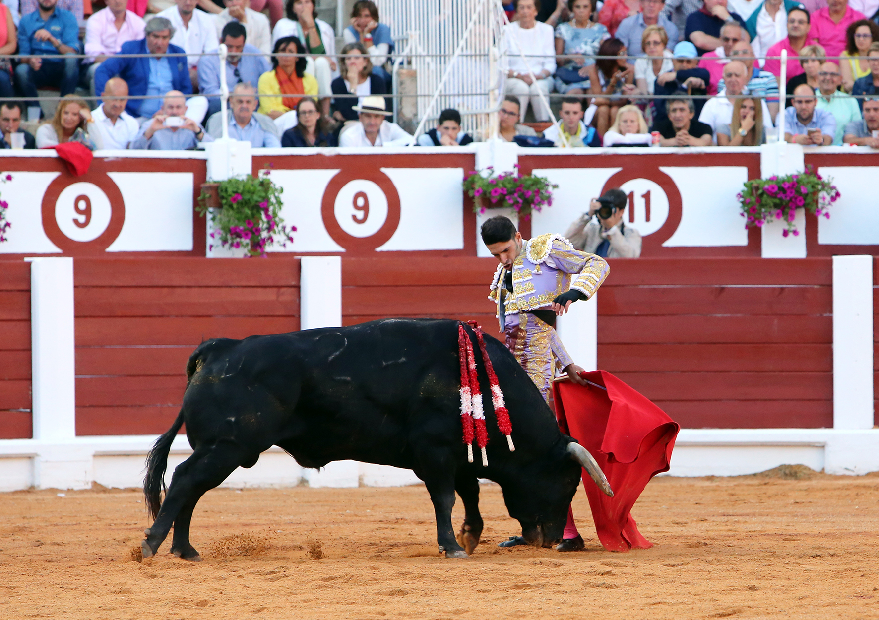 El subalterno a la salida del toro, lo alegra, citándolo de lejos con el capote, Gijón, 12.8.2017